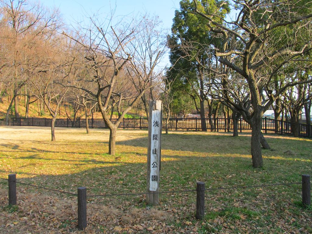 浅間山。浅間山公園。東京都府中市